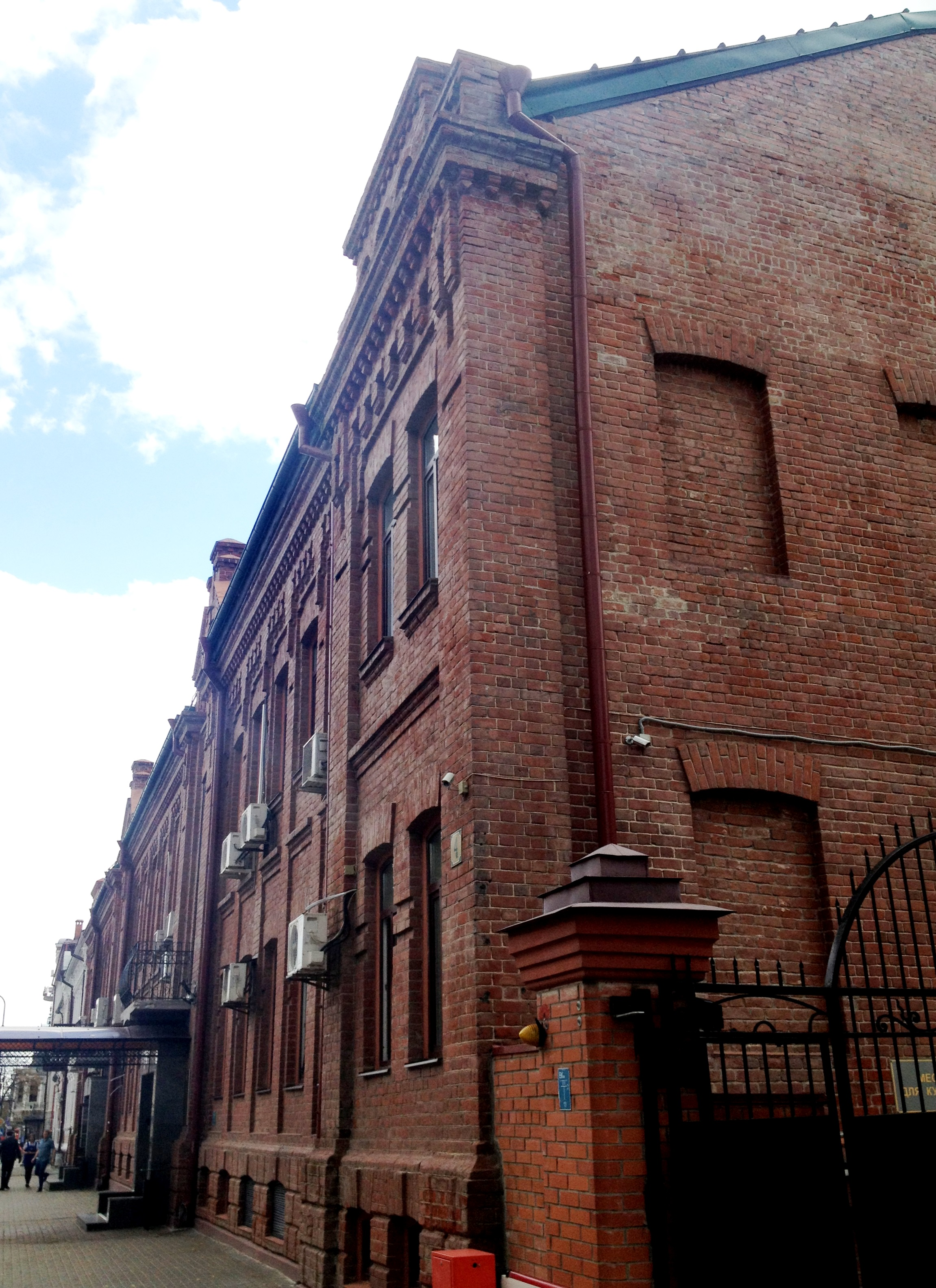 Дом, в котором жил заслуженный деятель искусств ТаССР Тази Гиззат: улица Островского, 4, Казань, Татарстан